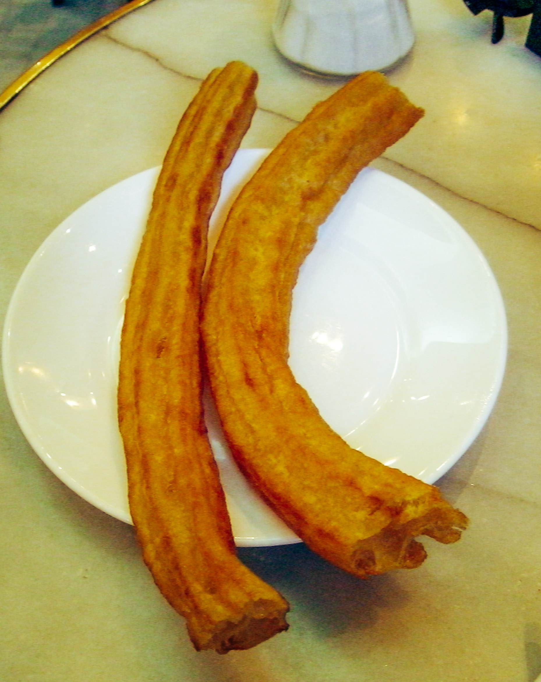 porras